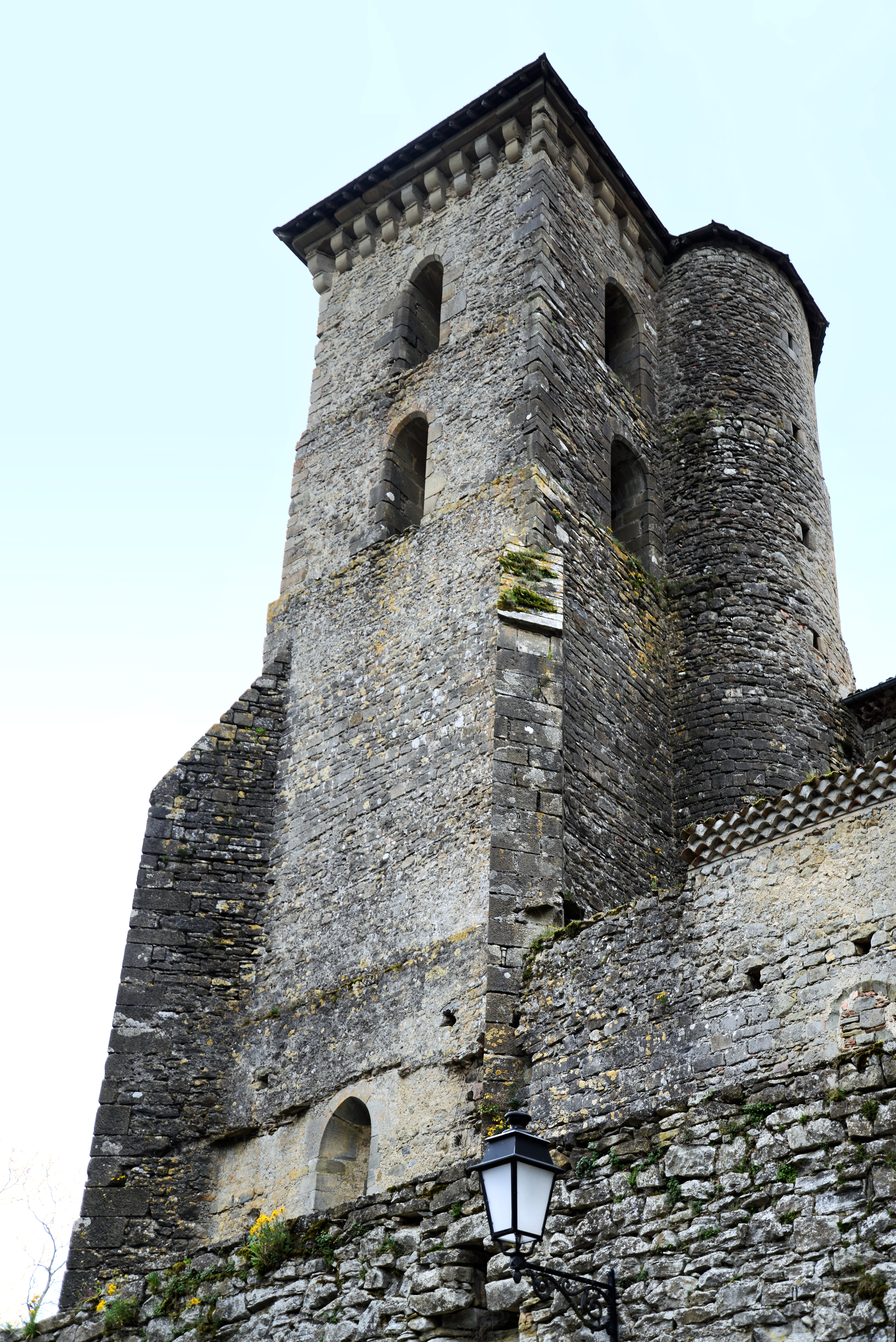 Camon, Ariège (Midi-Pyrénées) - La tour carrée des remparts située au milieu des remparts Nord de la Cité.